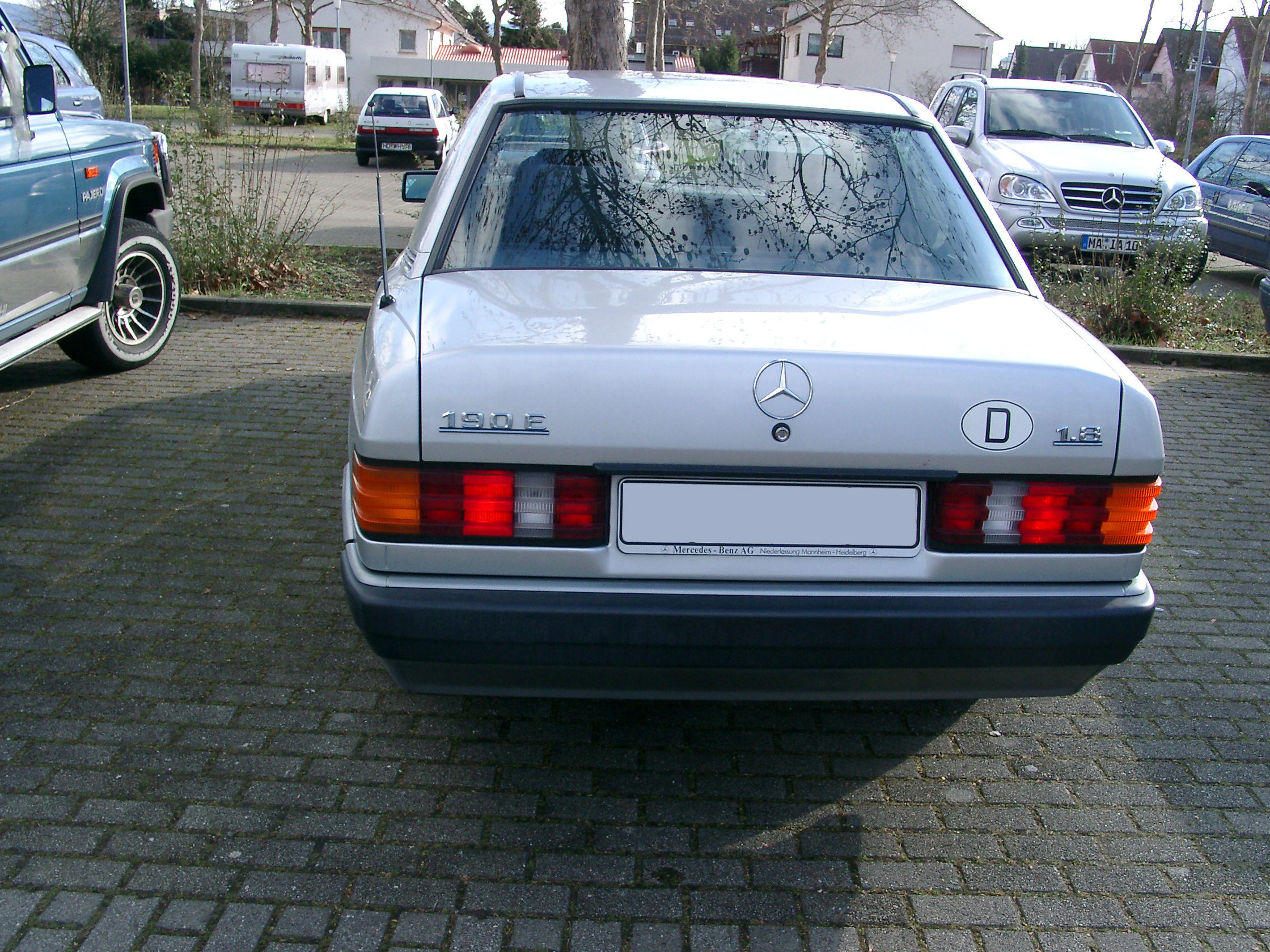 Mercedes Benz 190 E